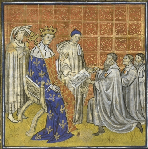 Louis X le Hutin recevant des Juifs et leur remettant un diplôme